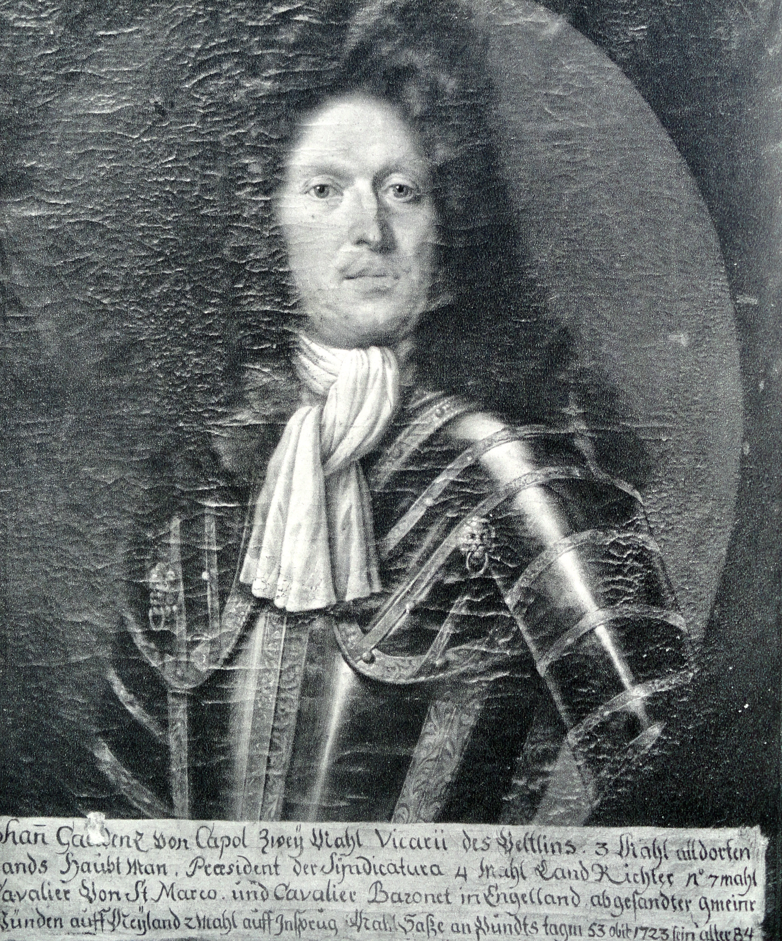 Johann Gaudenz von Capol, 1641-1723